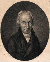 Porträt des Chirurgen Heinrich Callisen